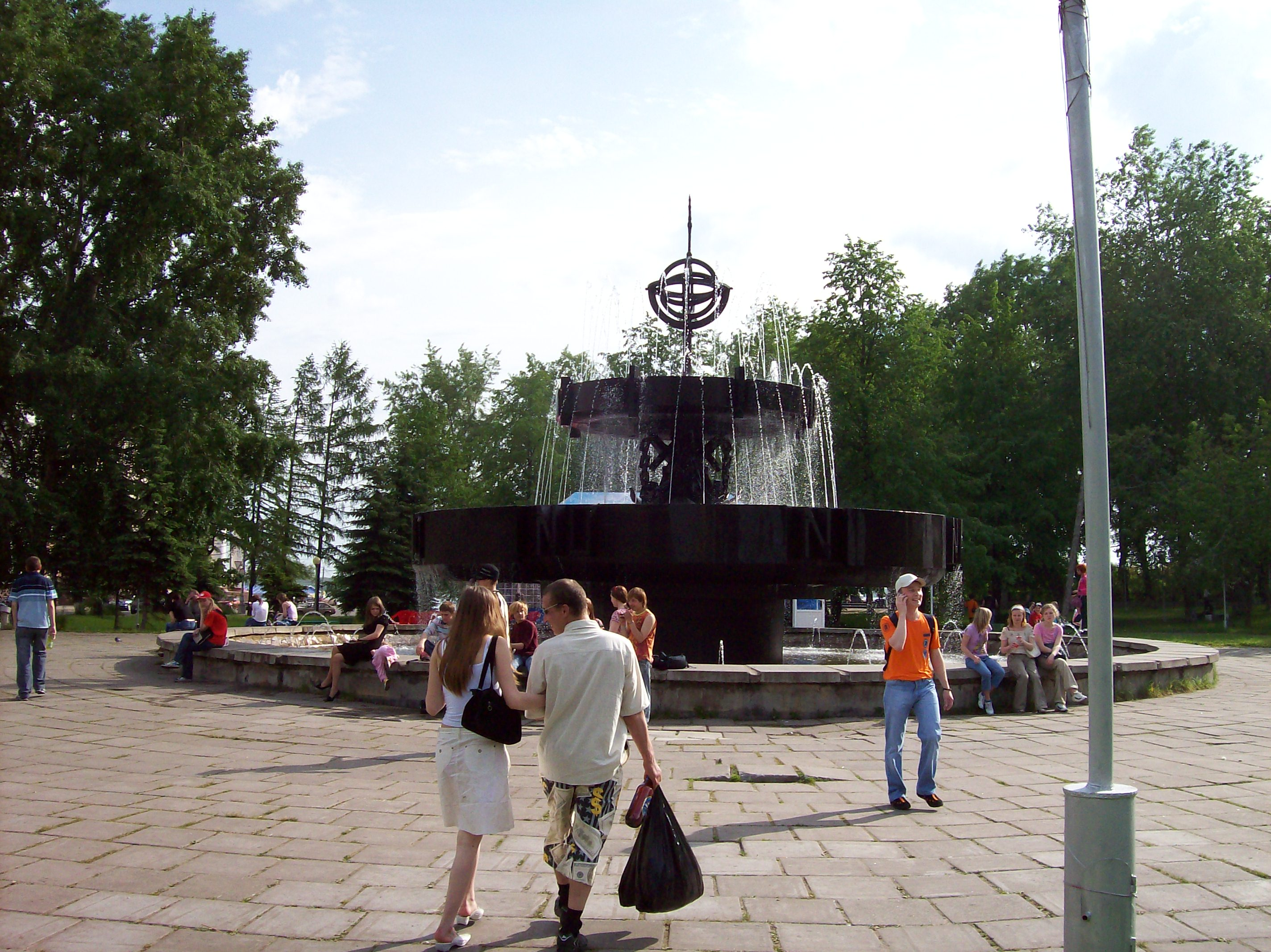 Архангельск. Фонтан возле театра драмы